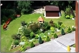 Wydział Biologii i Ochrony Środowiska Uniwersytetu Śląskiego, ul. Jagiellońska 28, Katowice